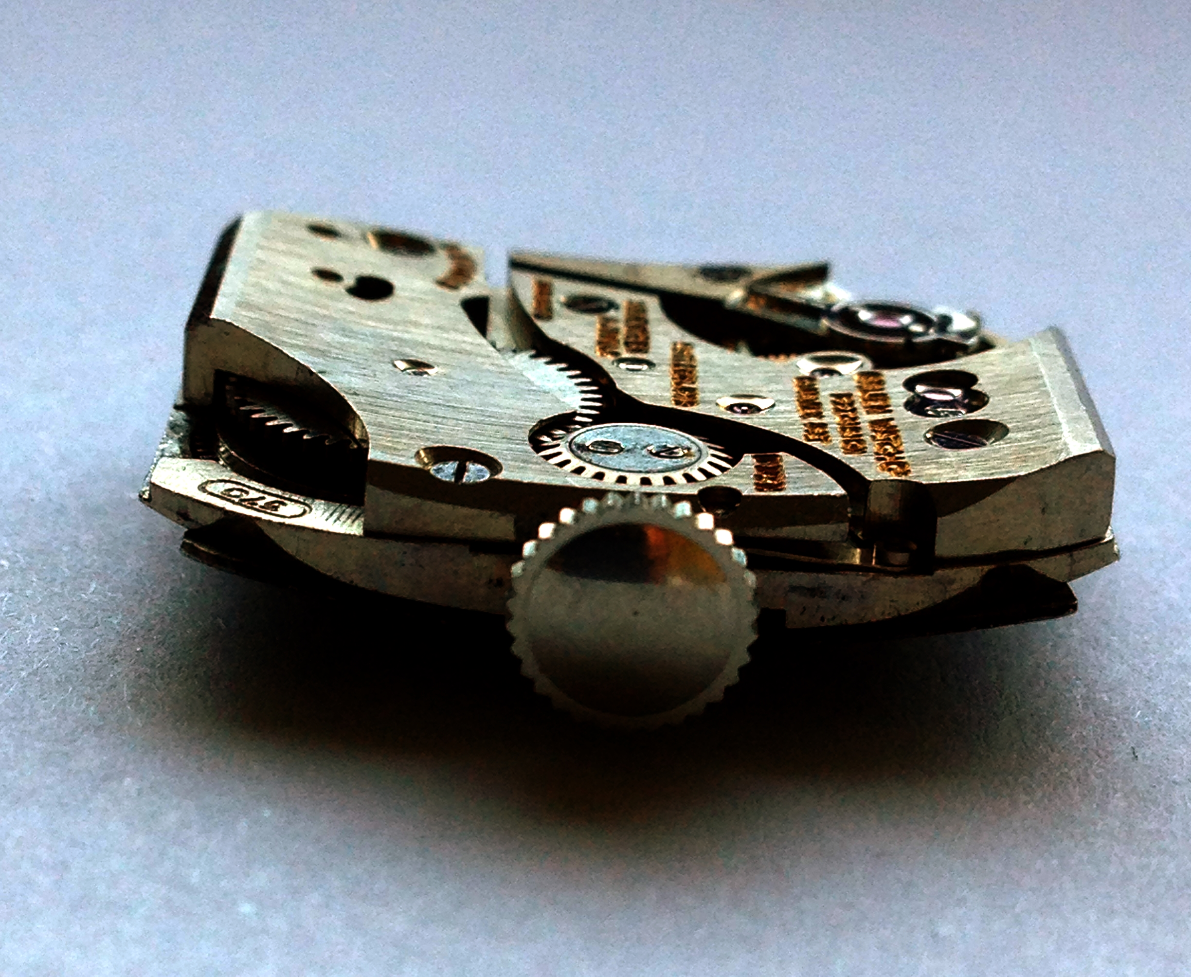 Gruen Curvex 370 Laufwerk